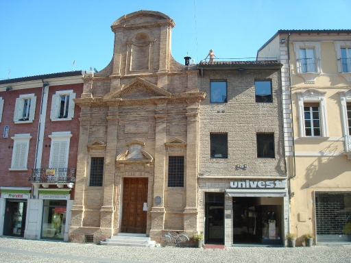 Eglise San Anna e Gioacchino, pizza del Popolo à Cesena (Italie)